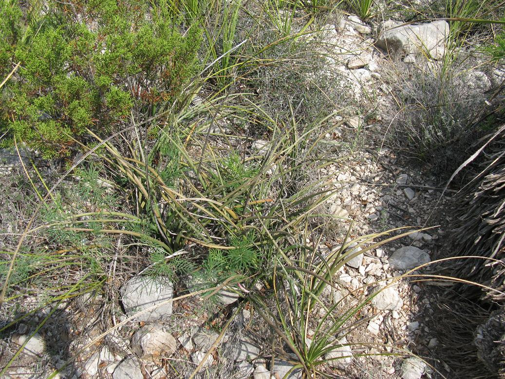 Hesperaloe parviflora fh 427.38 und Dasylirion texanum fh 1207.10 in Dolan Falls Texas